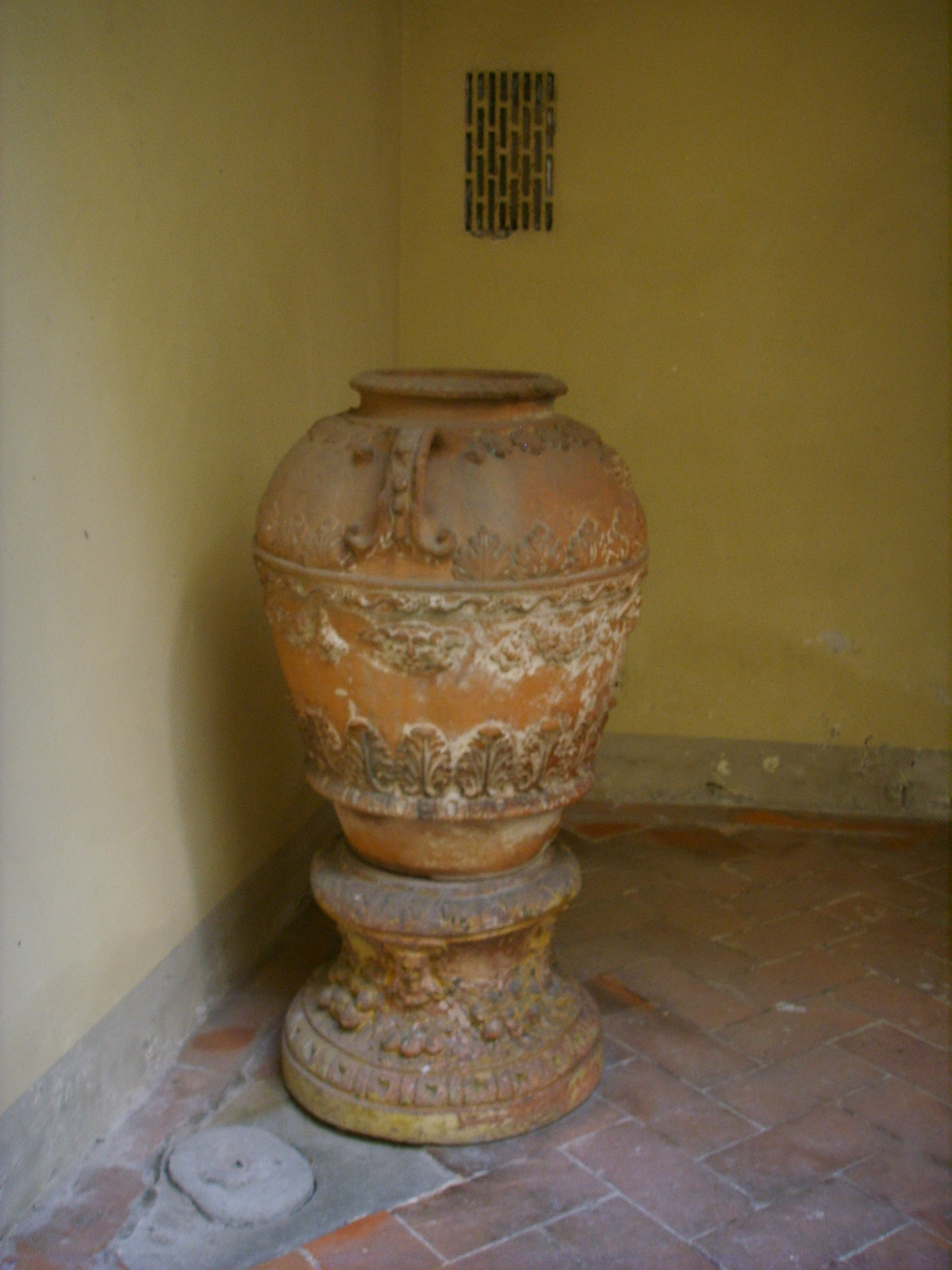 Orcio nel cortile del Palazzo Stiozzi Ridolfi, Firenze - Italia